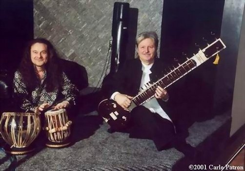 Aldo Tagliapietra e Michi Dei Rossi (Le Orme), 2001